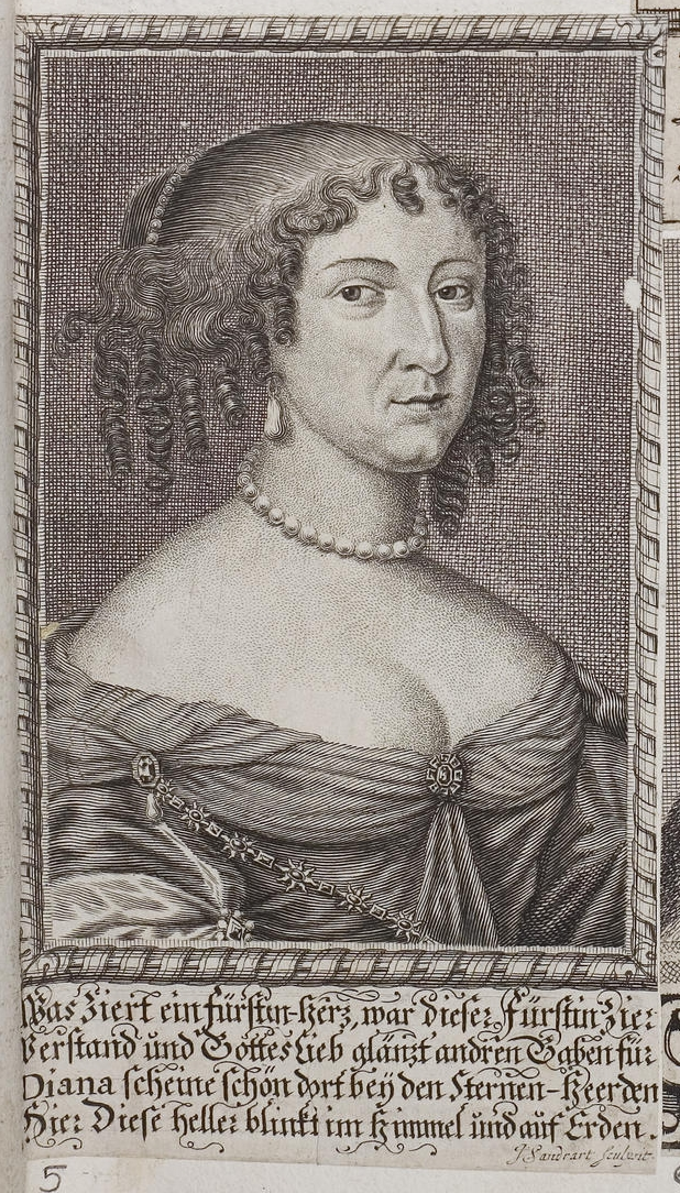 Grafik aus dem Klebeband Nr. 2 der Fürstlich Waldeckschen Hofbibliothek Arolsen Motiv: Markgräfin Erdmuthe Sophie von Brandenburg-Bayreuth, geb. Prinzessin von Sachsen darunter Gedicht (wohl von Sigmund von Birken): Was ziert ein Fürsten-Herz, war dieser Fürstin Zier. Verstand und Gottes Lieb glänzt andren Gaben für. Diana scheine schön dort bey den Sternen-Heerden: Hier diese heller blinkt im Himmel und auf Erden.